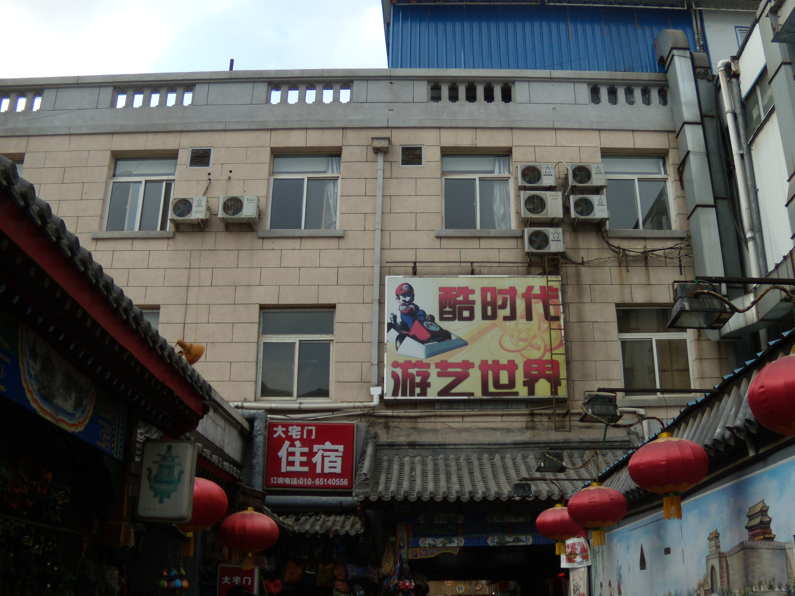 王府井民俗文化街，位于好友世界商场西侧